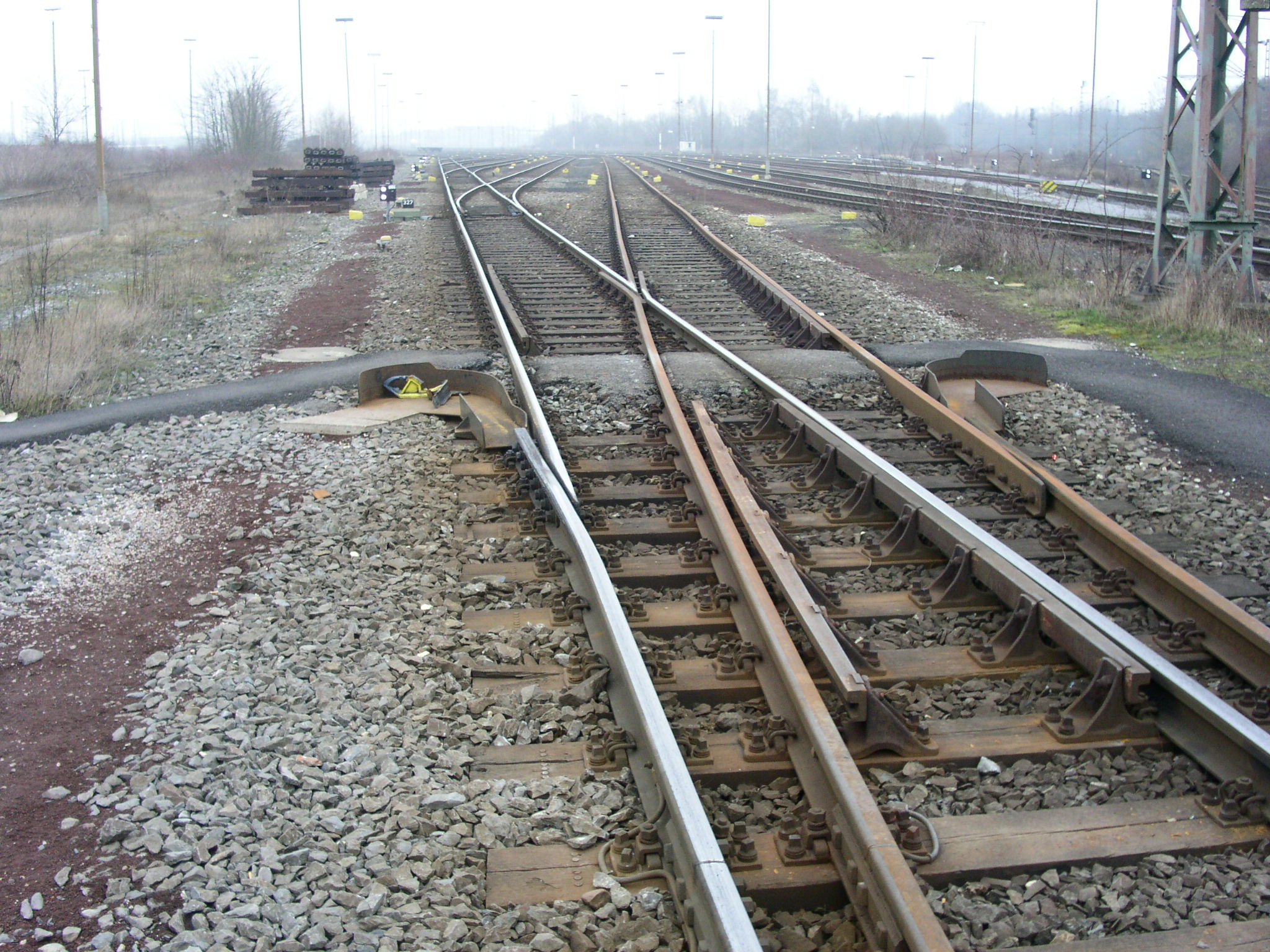 Hemmschuhauswurfbremse